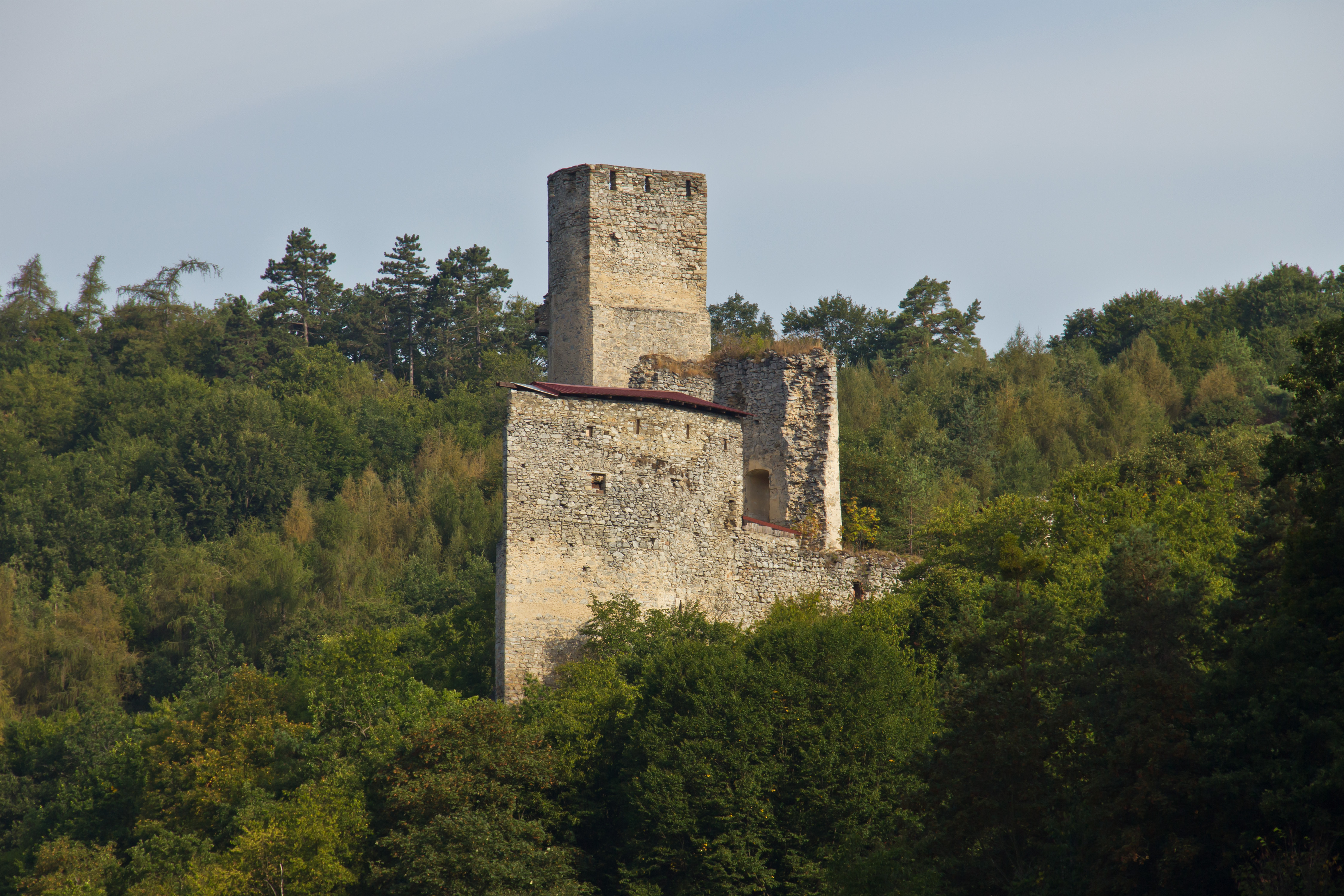 Die über den Tälern der Großen Taffa und des Farnbaches erhöht auf dem nach drei Seiten abfallenden Gelände gelegene Burg wurde 1767 zerstört.